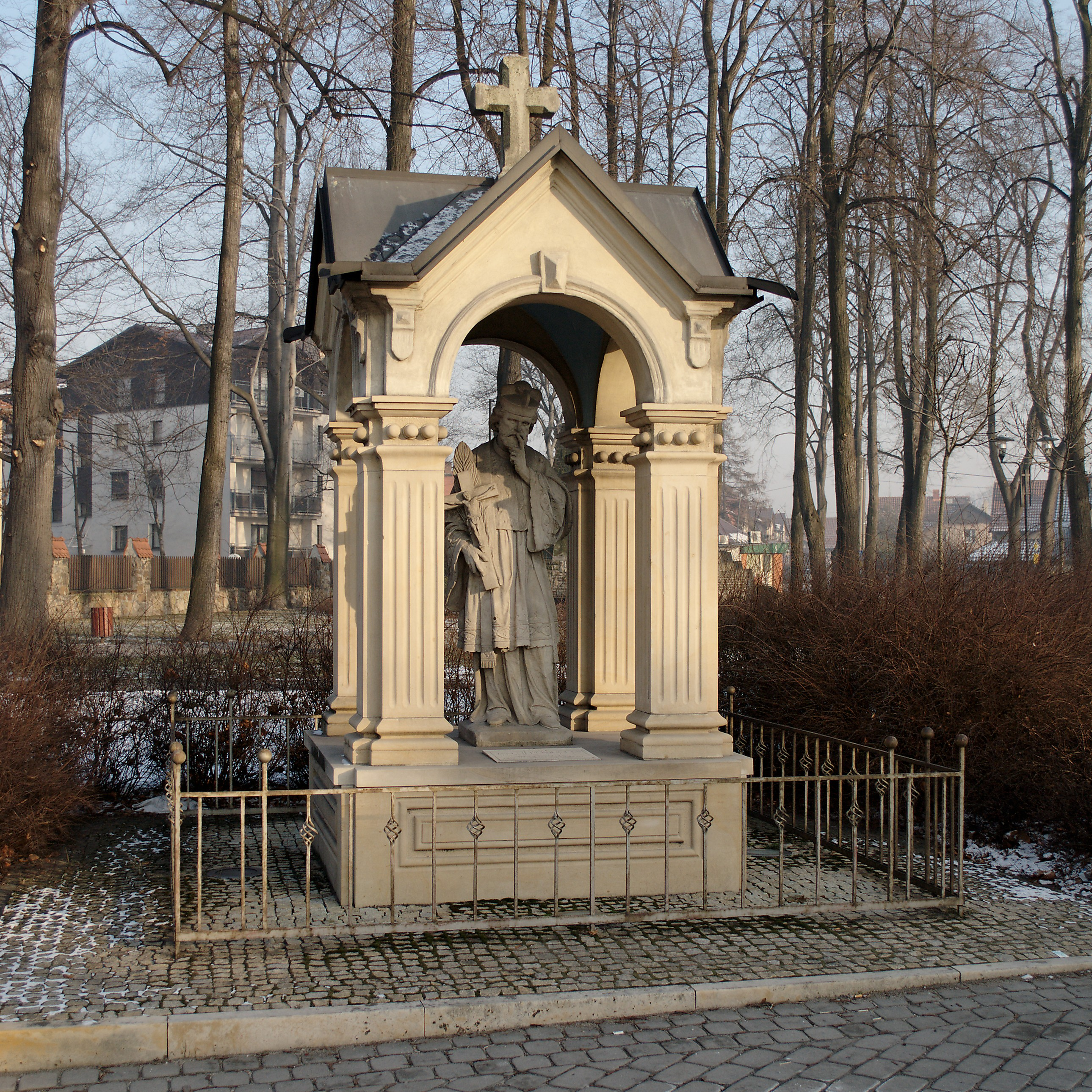 Knurów. Kapliczka św. Jana Nepomucena na rogu ulic Koziełka i Dworcowej.